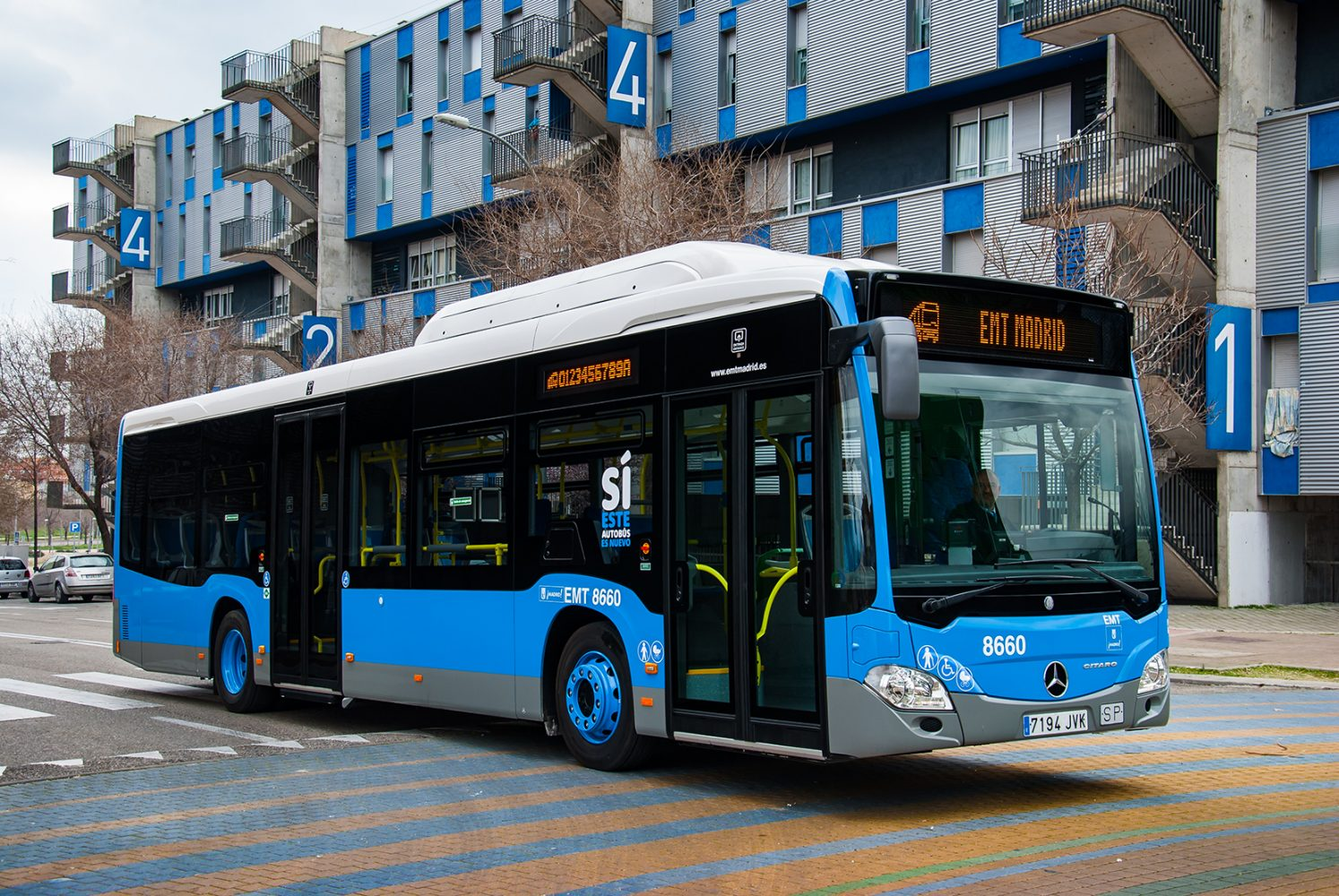 La Empresa Municipal de Transportes y el Ayuntamiento de Madrid continúan apostando por la renovación de la flota de autobuses, haciendo un esfuerzo inversor sin precedentes en la última década. Prueba de ello es la reciente adjudicación de un lote adicional de 89 unidades para el periodo 2017-2018 que se unirán a los 400 ya adjudicados para este bienio, de los cuales las primeras unidades ya han empezado a prestar servicio en las calles de la ciudad. Entre los 89 vehículos adjudicados, se encuentran, por primera vez en la historia de la compañía, 15 autobuses de 12 metros de propulsión eléctrica. Hasta el momento la empresa pública solo disponía de minibuses eléctricos para las líneas M1 y M2.